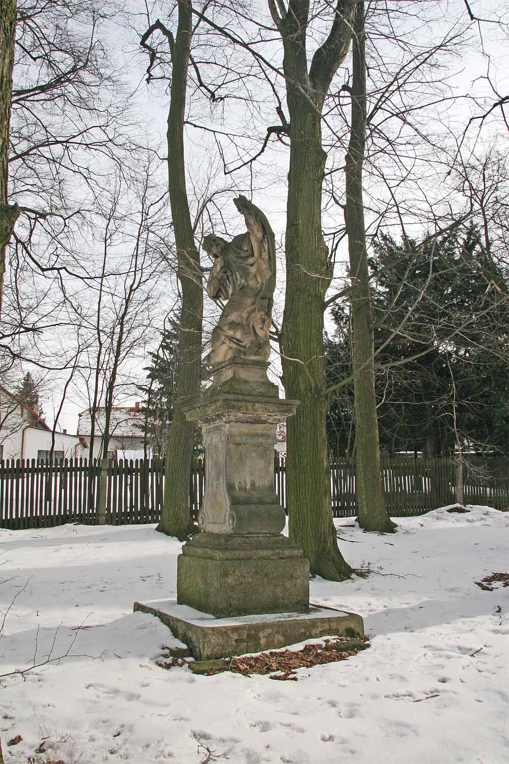 Vysoké Chvojno, okres Pardubice - Socha Sv. Jana Nepomuckého pod kostelem